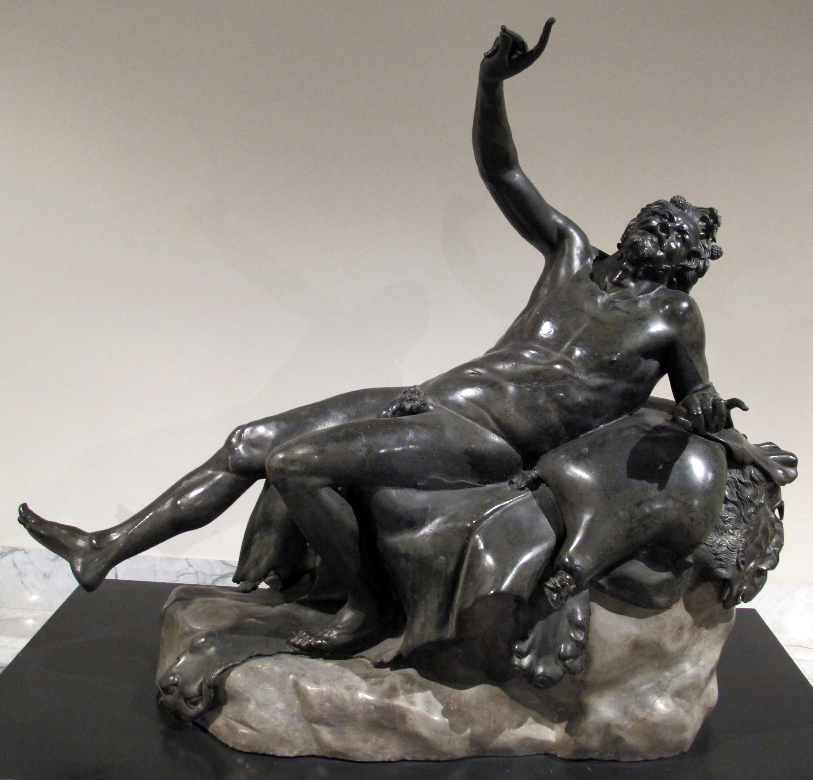 Ancient Roman art from the Villa of the Papyri (Herculaneum)